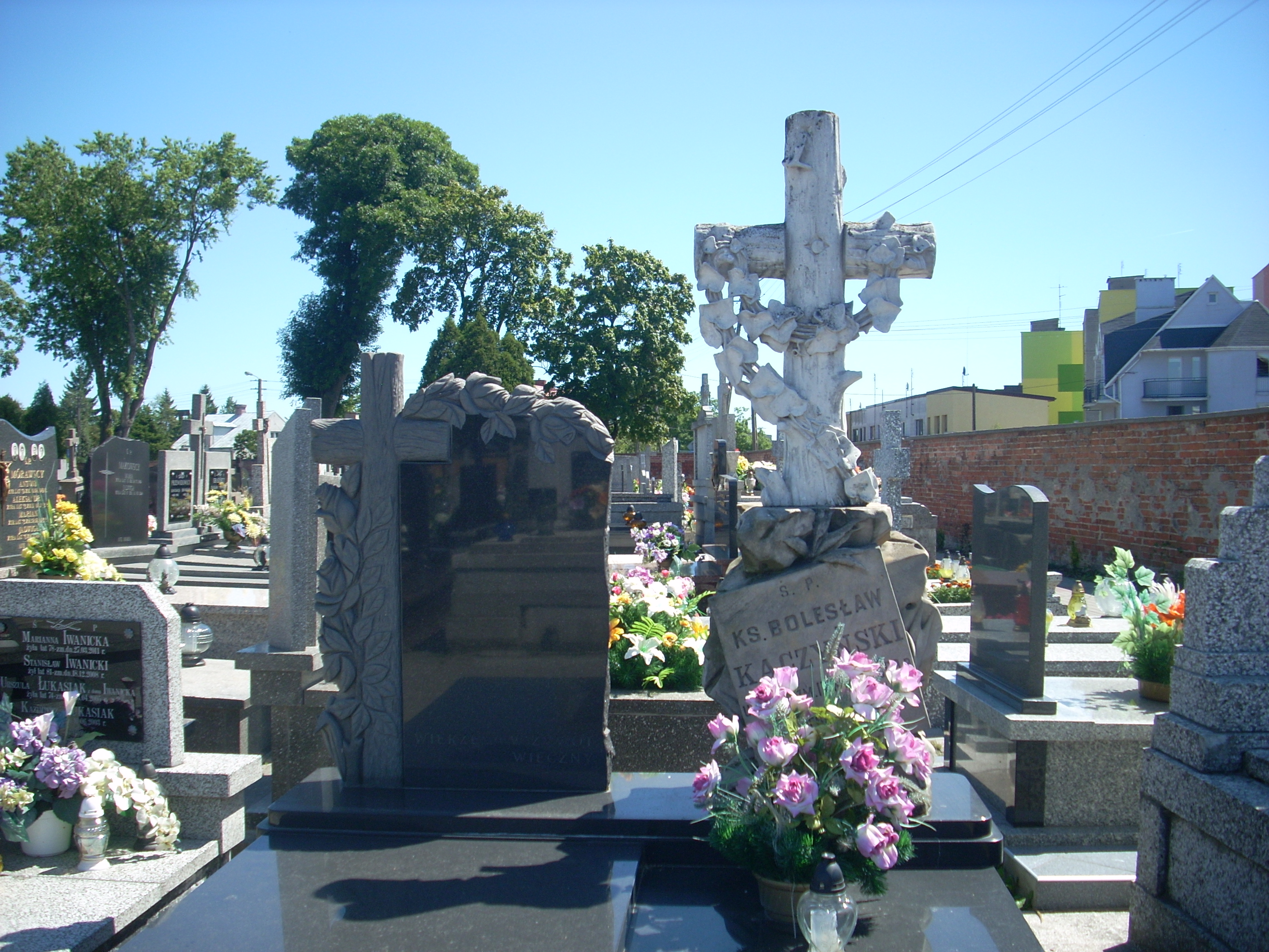 Nagrobek ks. Kaczyńskiego na cmentarzu katolickim w Przasnyszu, k. XIX w.